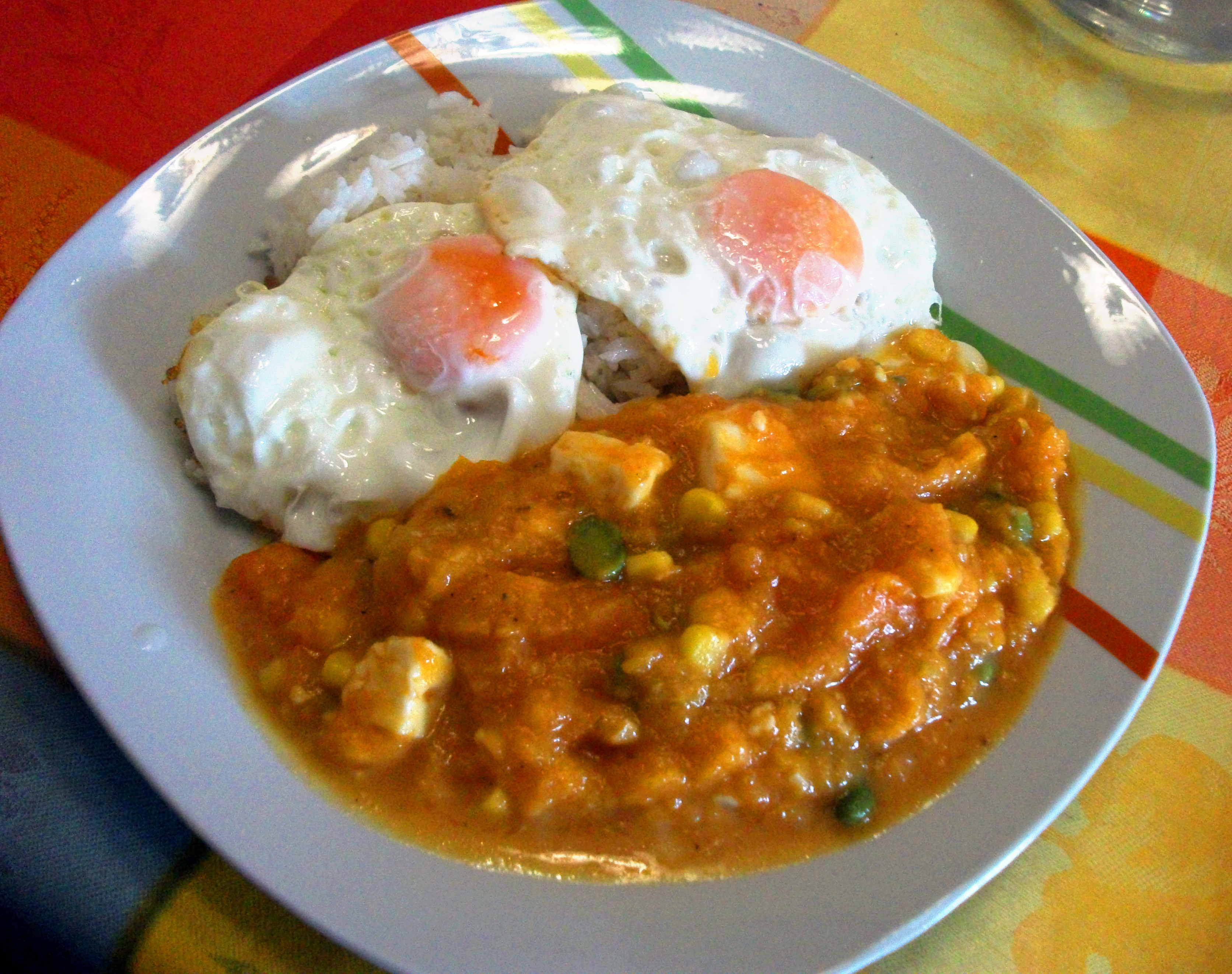 Locro peruano